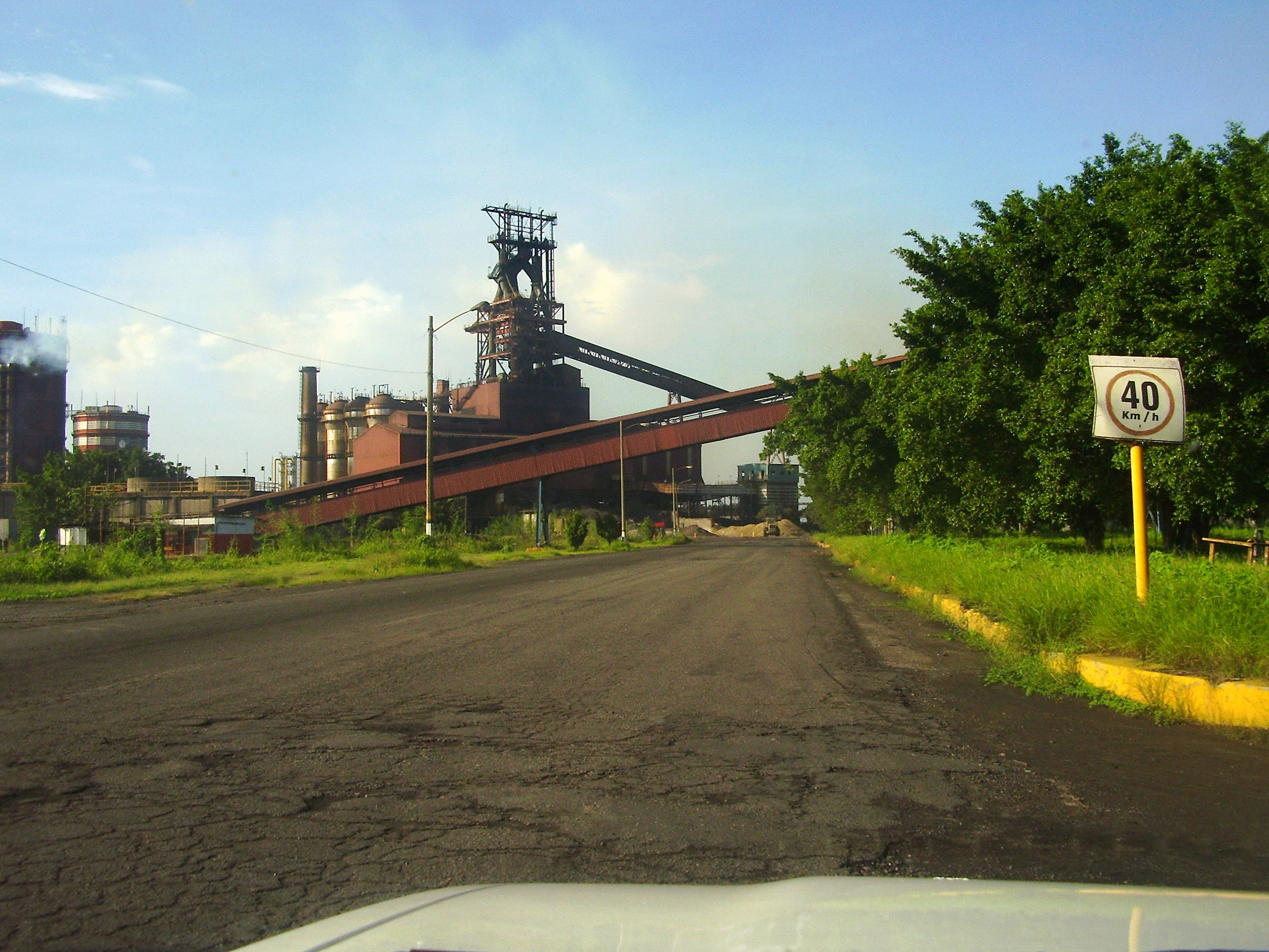 Planta siderúrgica SICARTSA — in Lázaro Cárdenas, Michoacán.